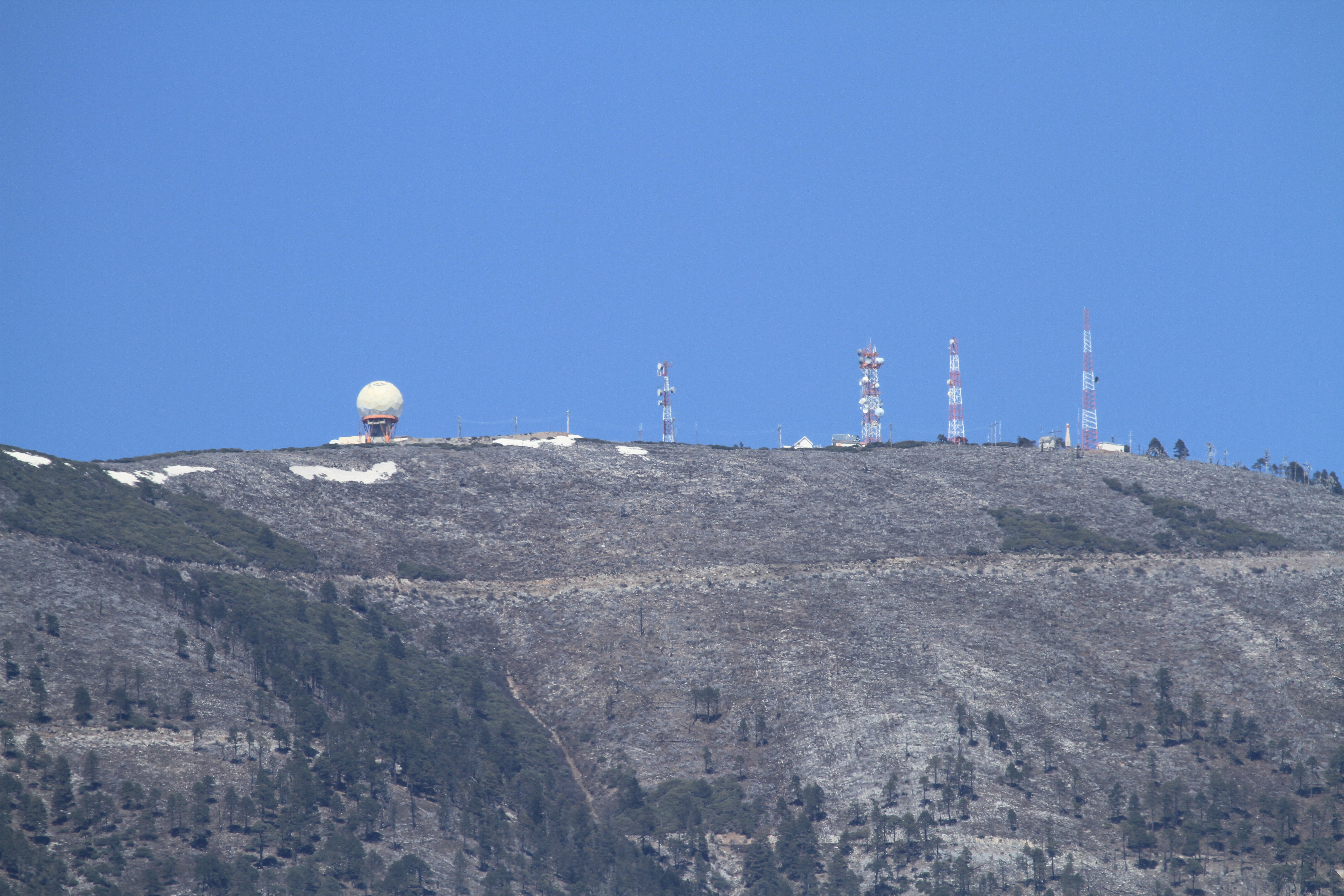 Cerro del Potosí desde el Pozo del Gavilán